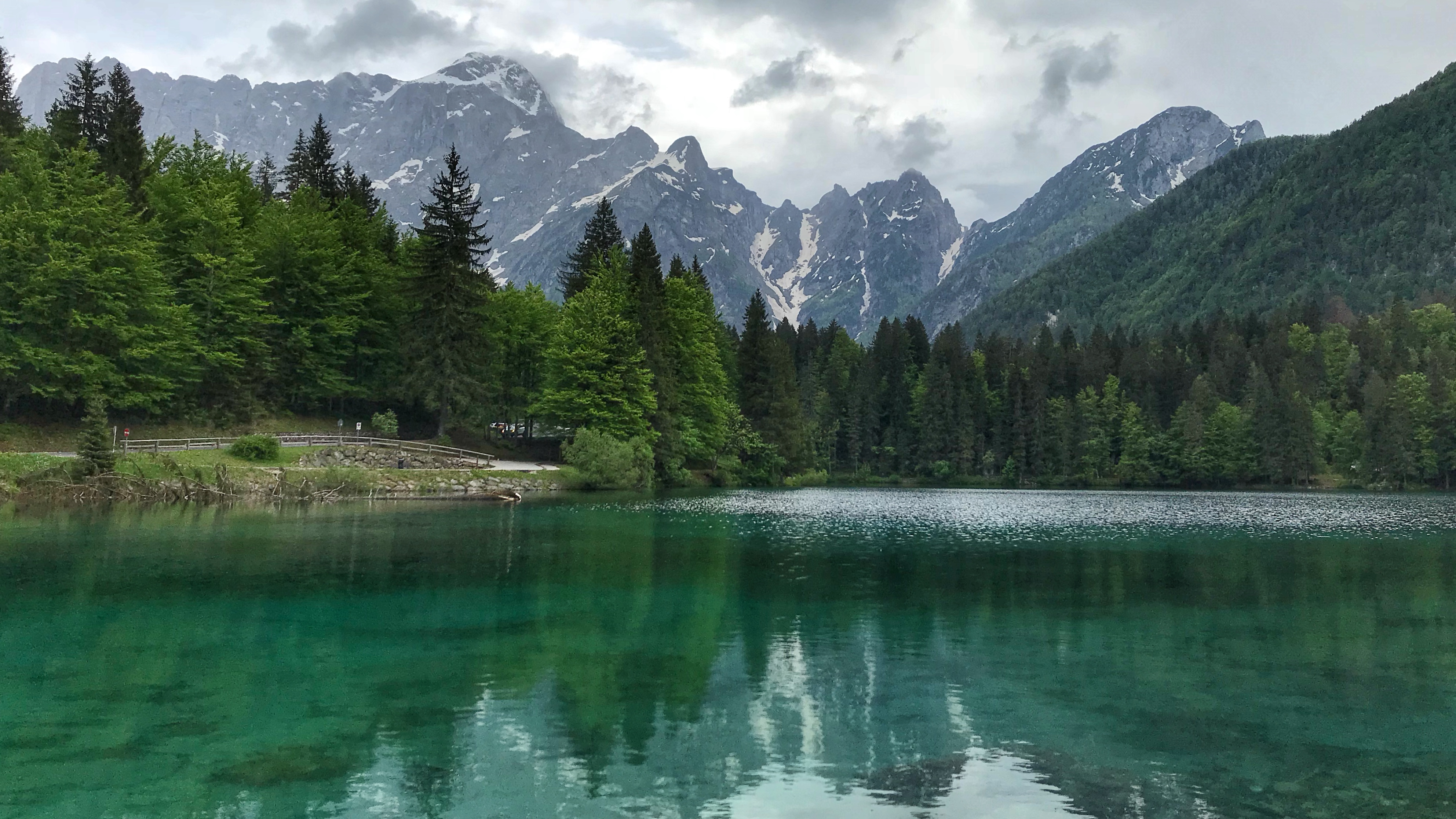 Conca di Fusine (Q49967813)